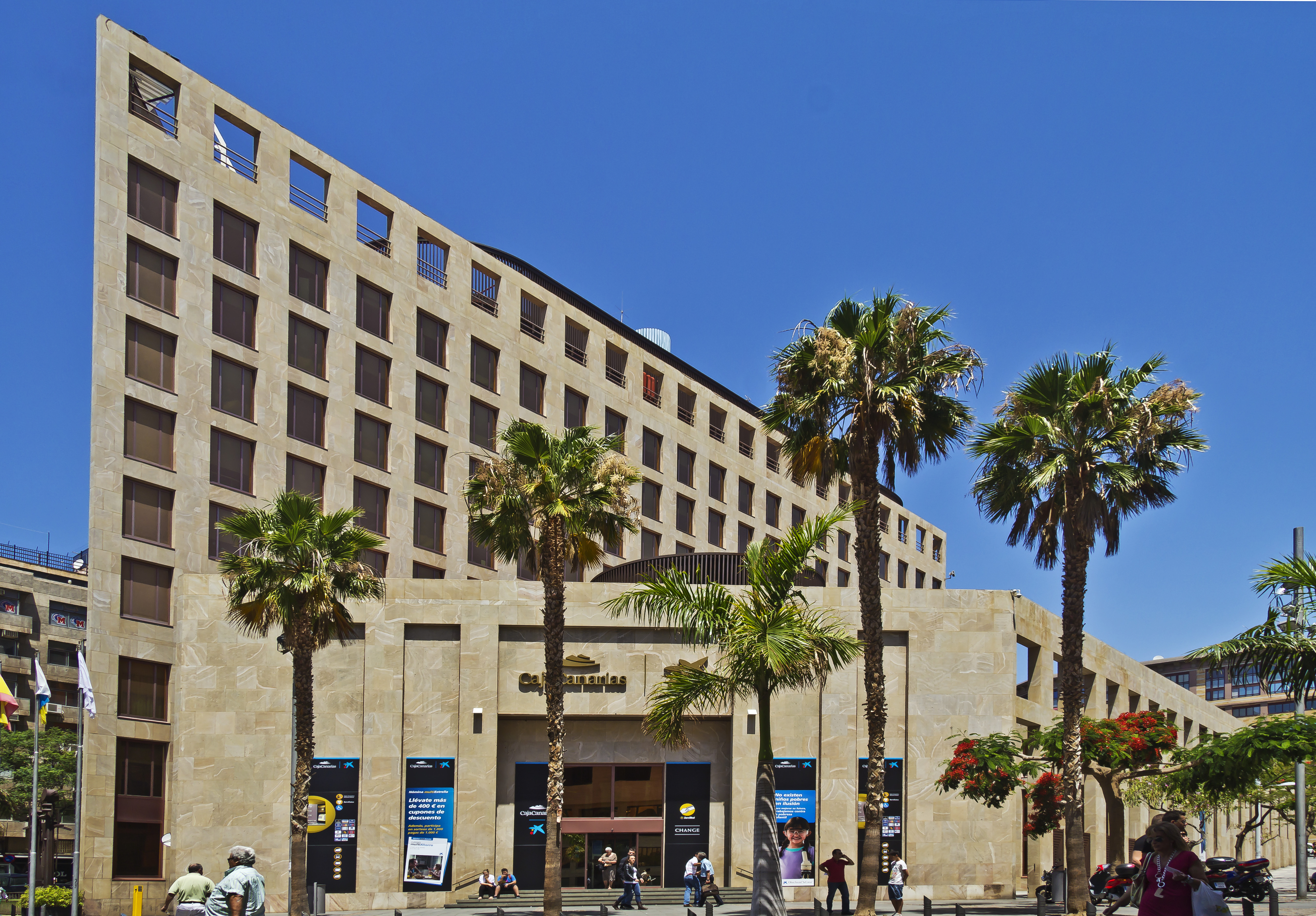 Das Gebäude der Hauptverwaltung der Caja Canarias (la Caixa) in Santa Cruz de Tenerife wurde im Jahr 1987 fertiggestellt. Die Architekten waren Francisco Artengo Rufino, José Ángel Domínguez Anadón und Carlos Schwartz Pérez. Seit der Übernahme Oficina Central La CAIXA